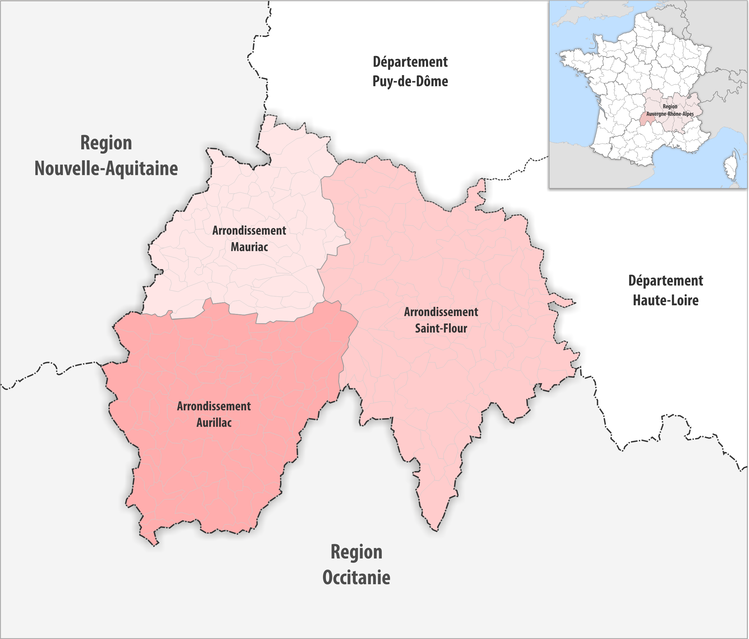 Gemeinden und Arrondissemente im Departement Cantal